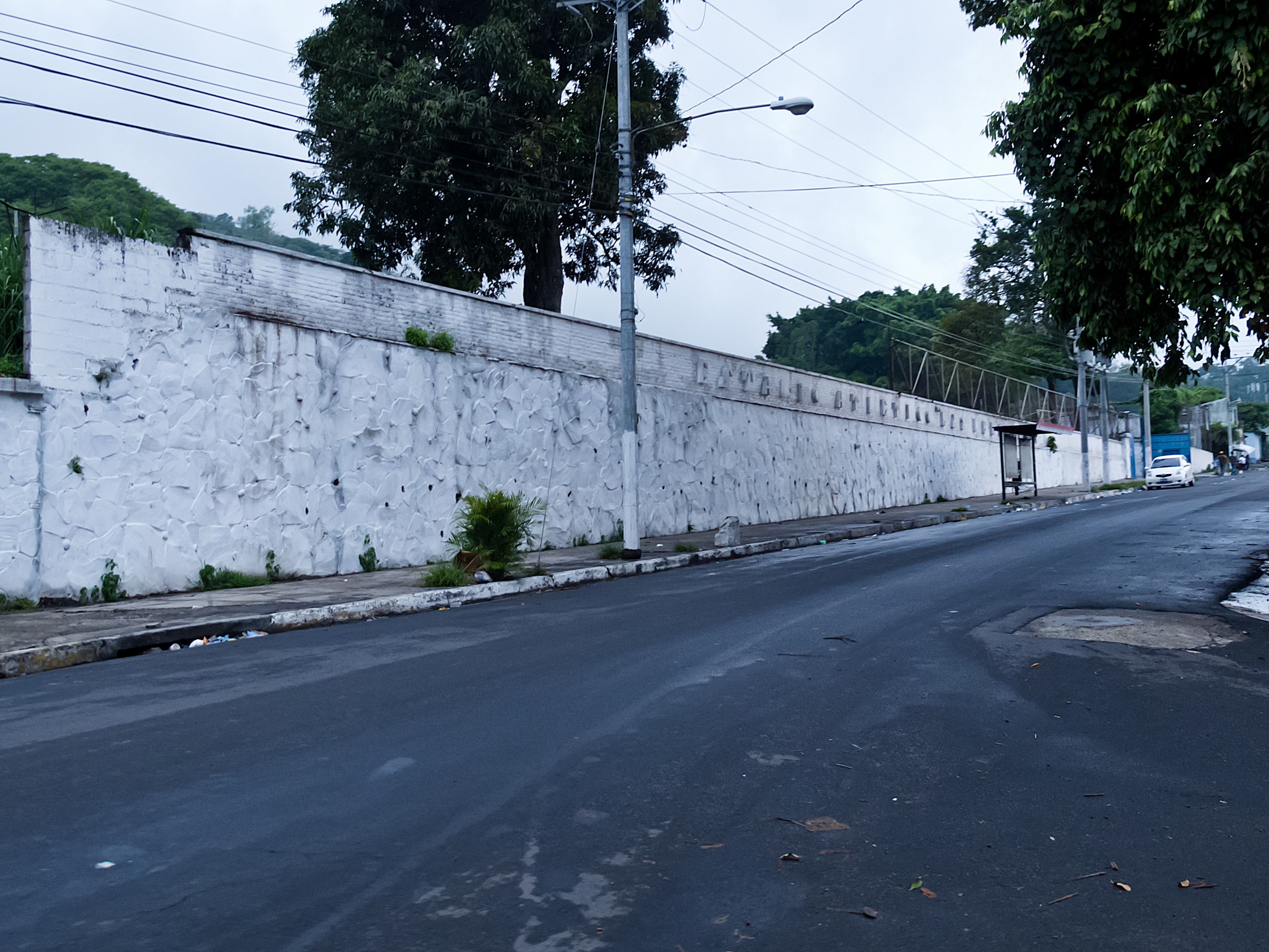 Entrada del Estadio de Las Delicias en Santa Tecla, La Libertad, El Salvador